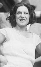 Suzanne Langlen (1899-1938) and Bill Tilden (1893-1953)